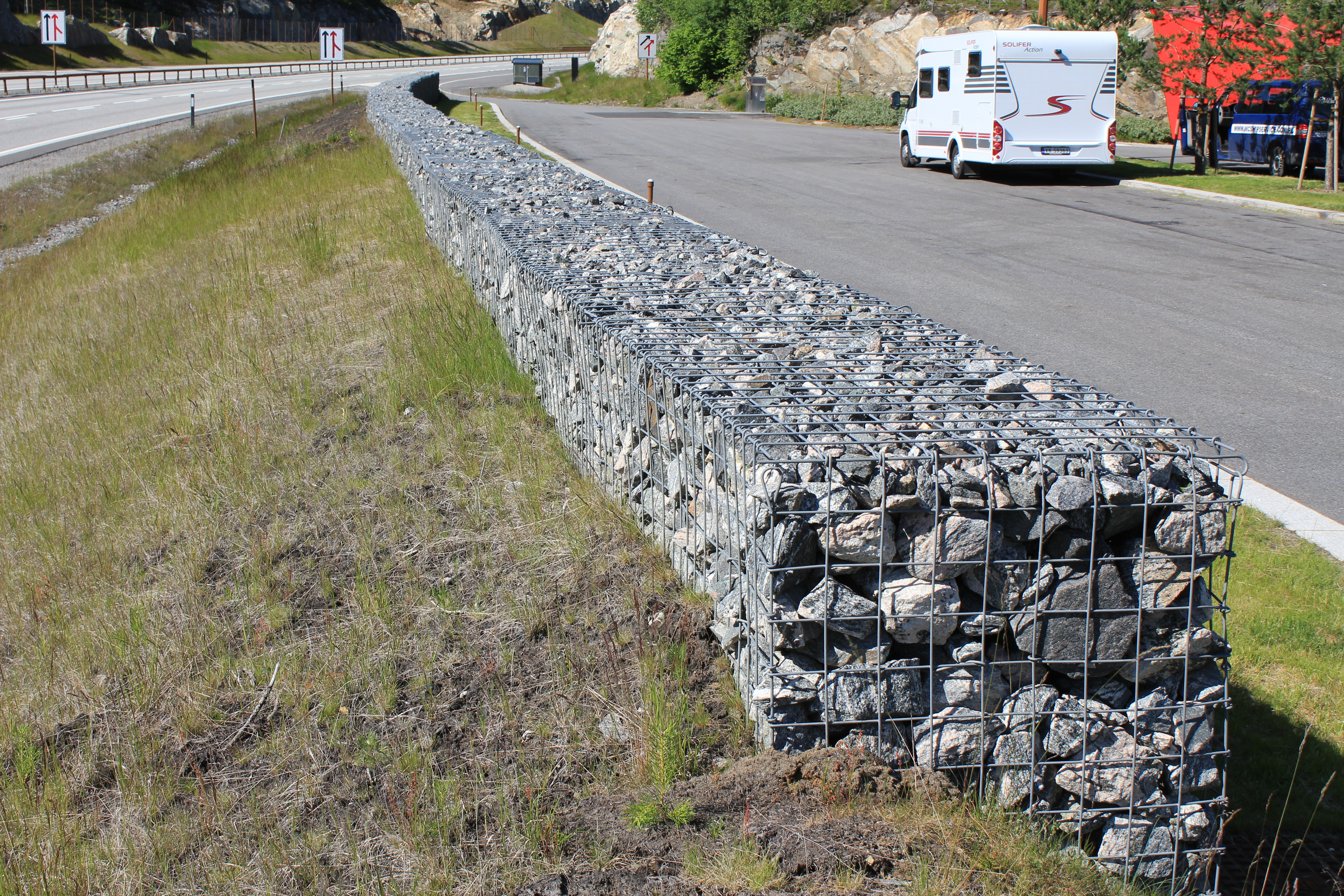 Gabioner som støyskjerm ved E6 ved Hurdalssjøen i Akershus